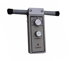 Radiopeileorientering: Radiopeilemottaker for 80m. Type PRX80PRO.